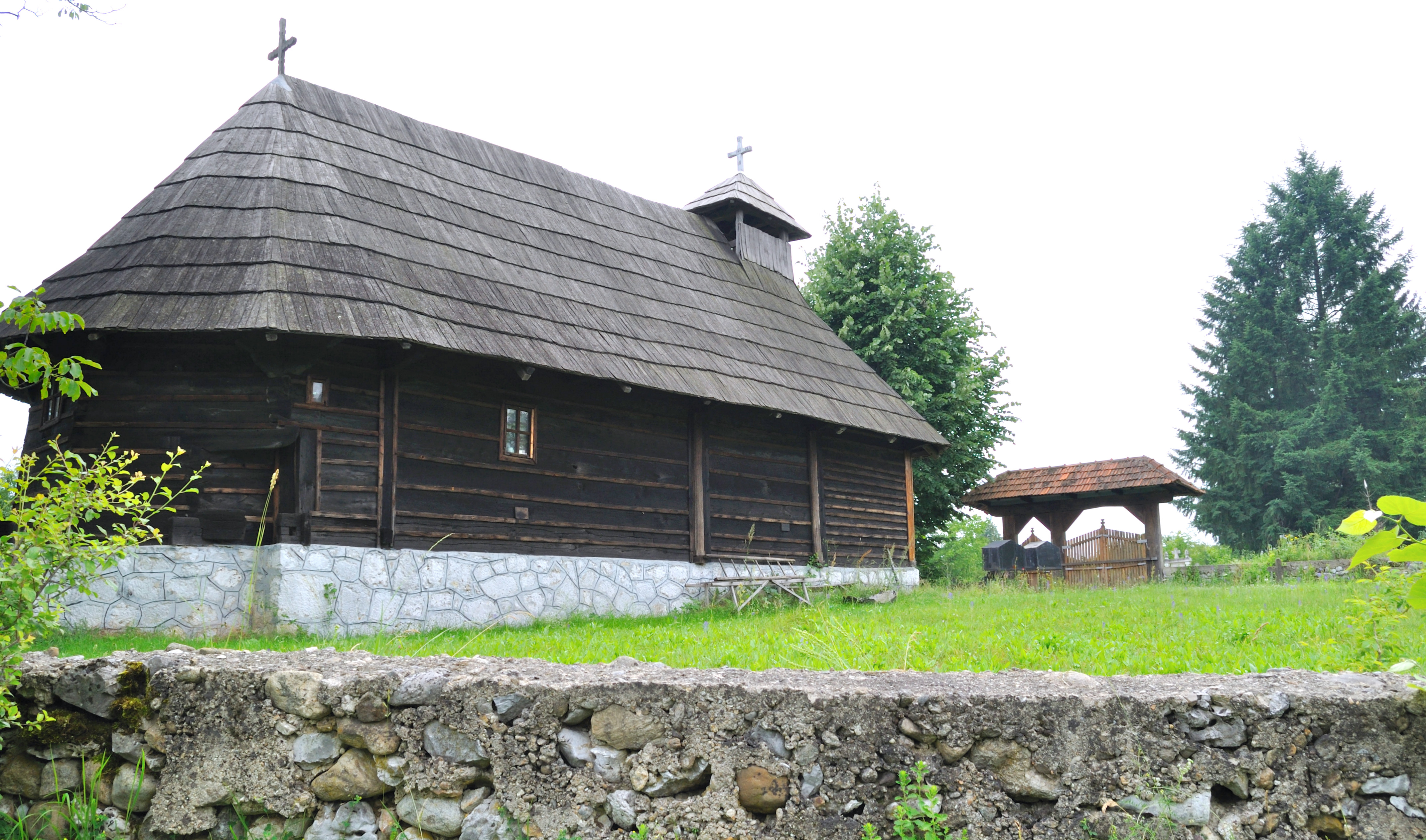 Biserica de lemn „Nașterea Maicii Domnuluii” din Gornovița, județul Gorj